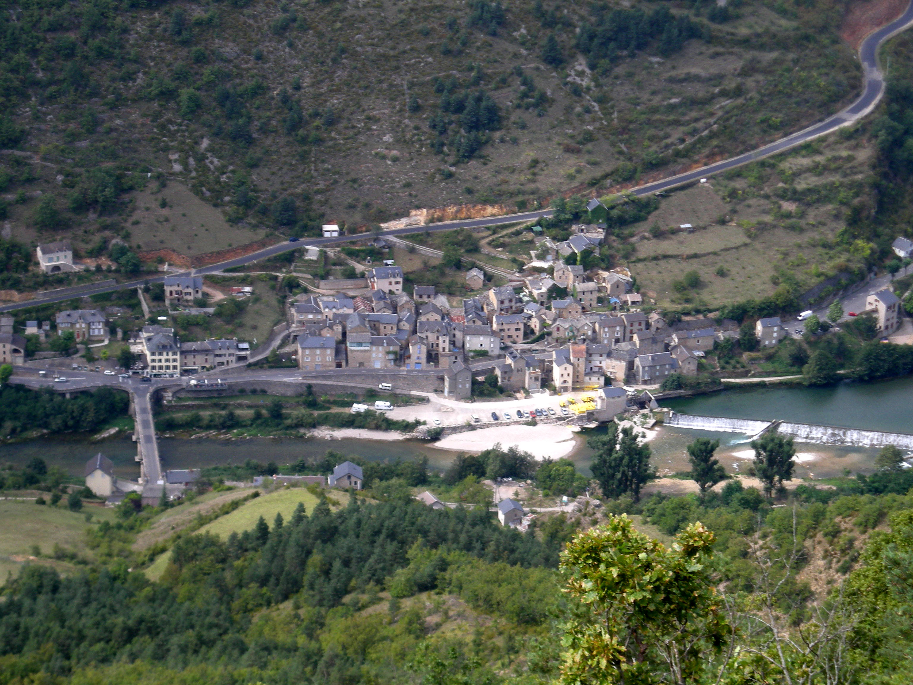 Vue sur Les Vignes (Lozère) et le Tarn, depuis le Causse Méjean